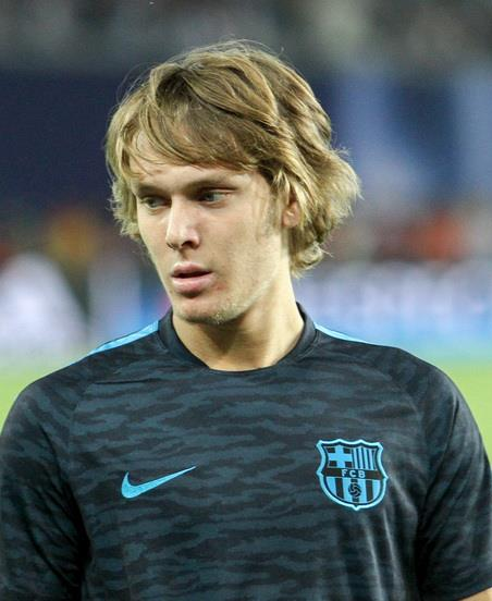 Перед матчем за Суперкубок УЄФА 2015 року у Тбілісі. Грузія